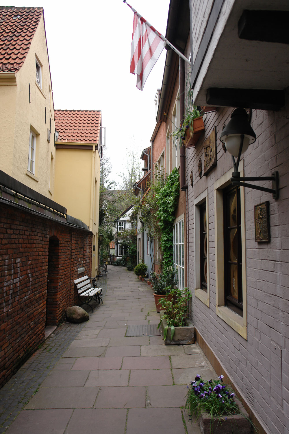 Bremen im Schnoor: Hinter der Balge.Die Denkmalgruppe „Schnoorviertel“ ist ein geschütztes Kulturdenkmal in der Freien Hansestadt Bremen, mit der Nr. 1114 beim Landesamt für Denkmalpflege registriert.